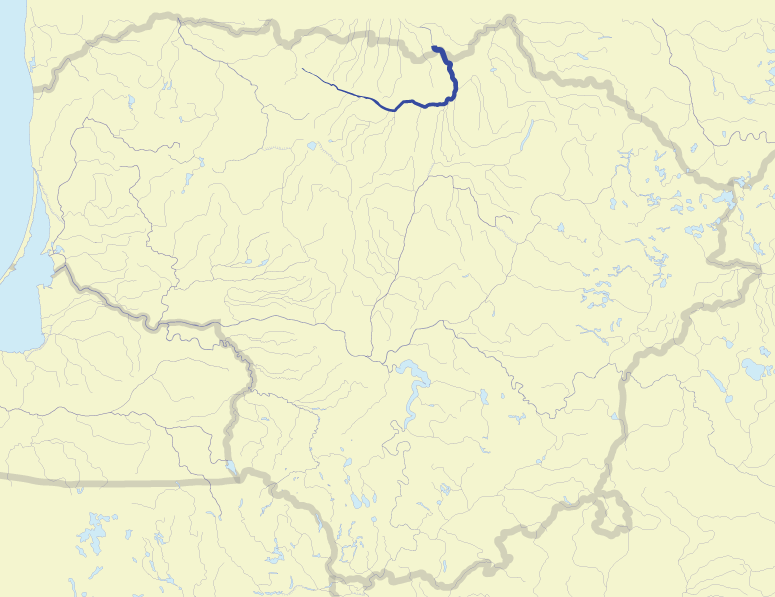 River Mūša